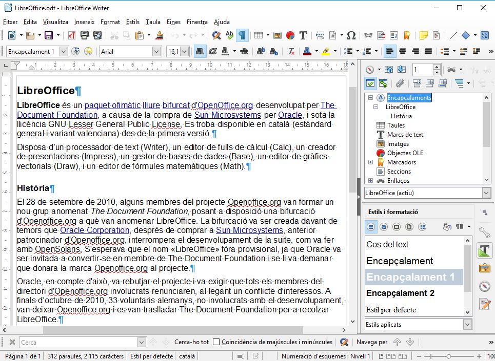 LibreOffice Writer 5.2 en Windows